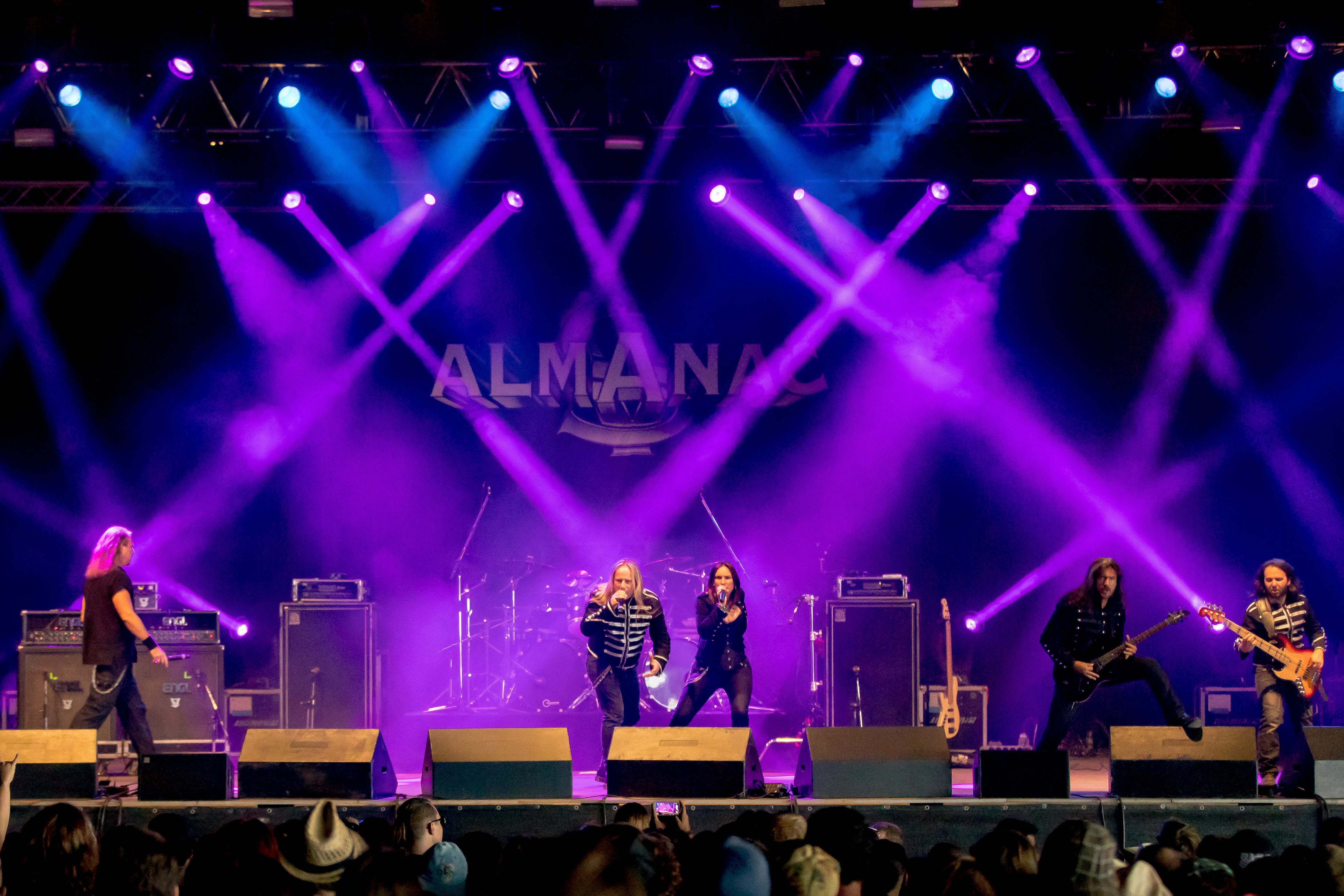 Almanac during Summer Breeze 2016 at , Dinkelsbühl, Bayern, Germany on 2016-08-17, Photo: Sven Mandel